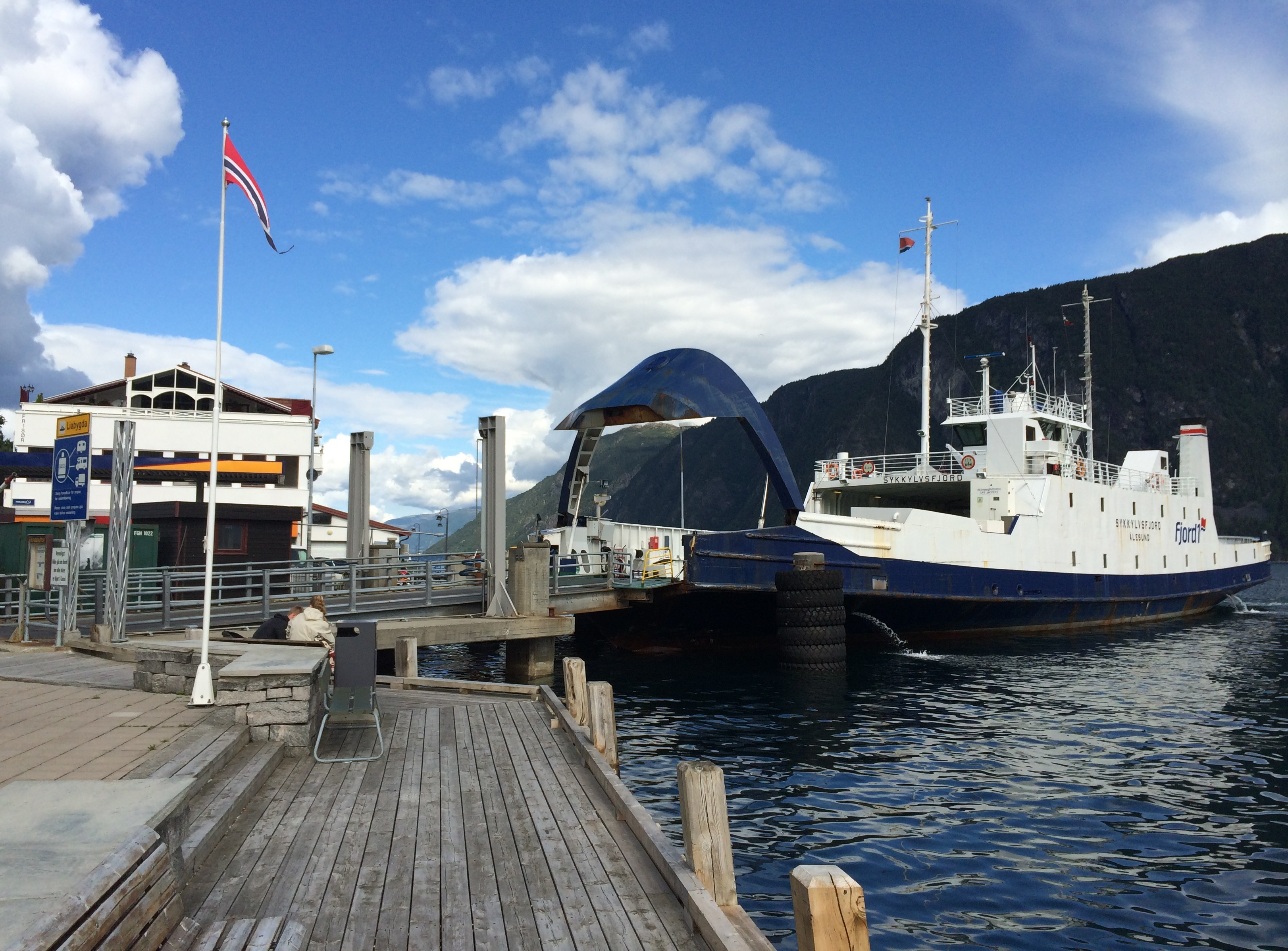 MF «Sykkylvsfjord» ved Stranda fergekai